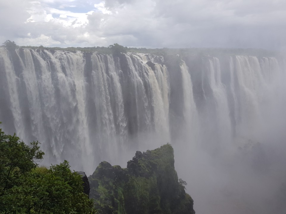 우기에 가까워 운이 좋게 본 빅토리아 메인 폭포